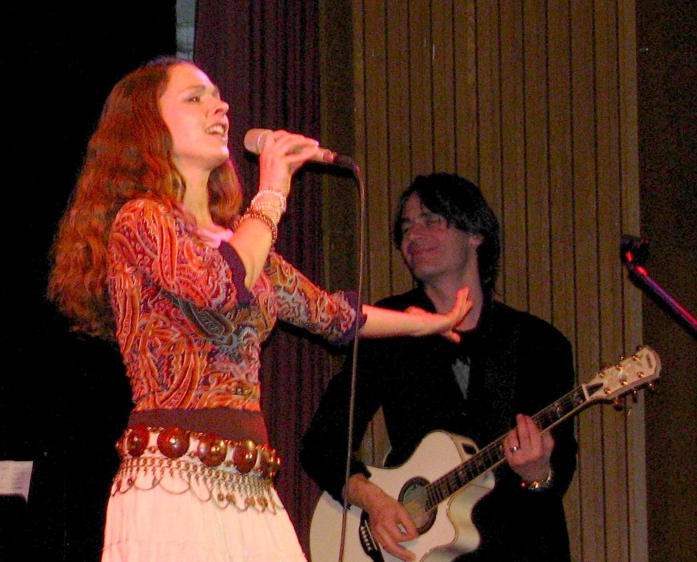 Dominique Lacasa bei einem Konzert in Mühlhausen (Thüringen).